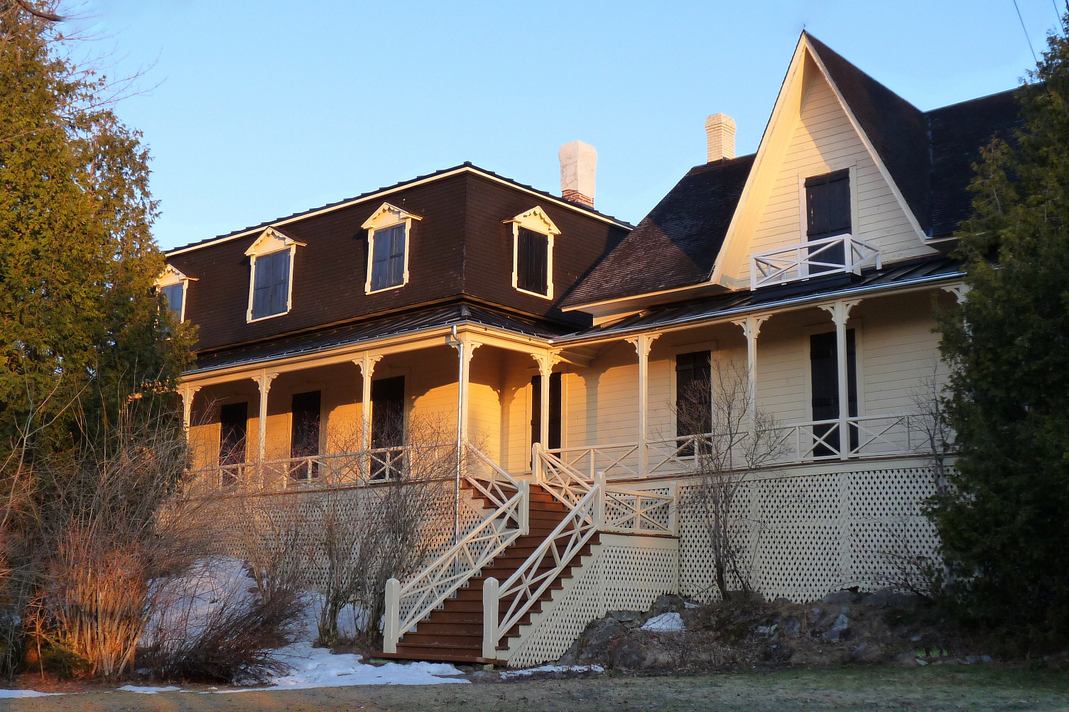 Maion d'été de John A. Macdonald de 1873 à 1890 à Rivière-du-Loup (Québec)